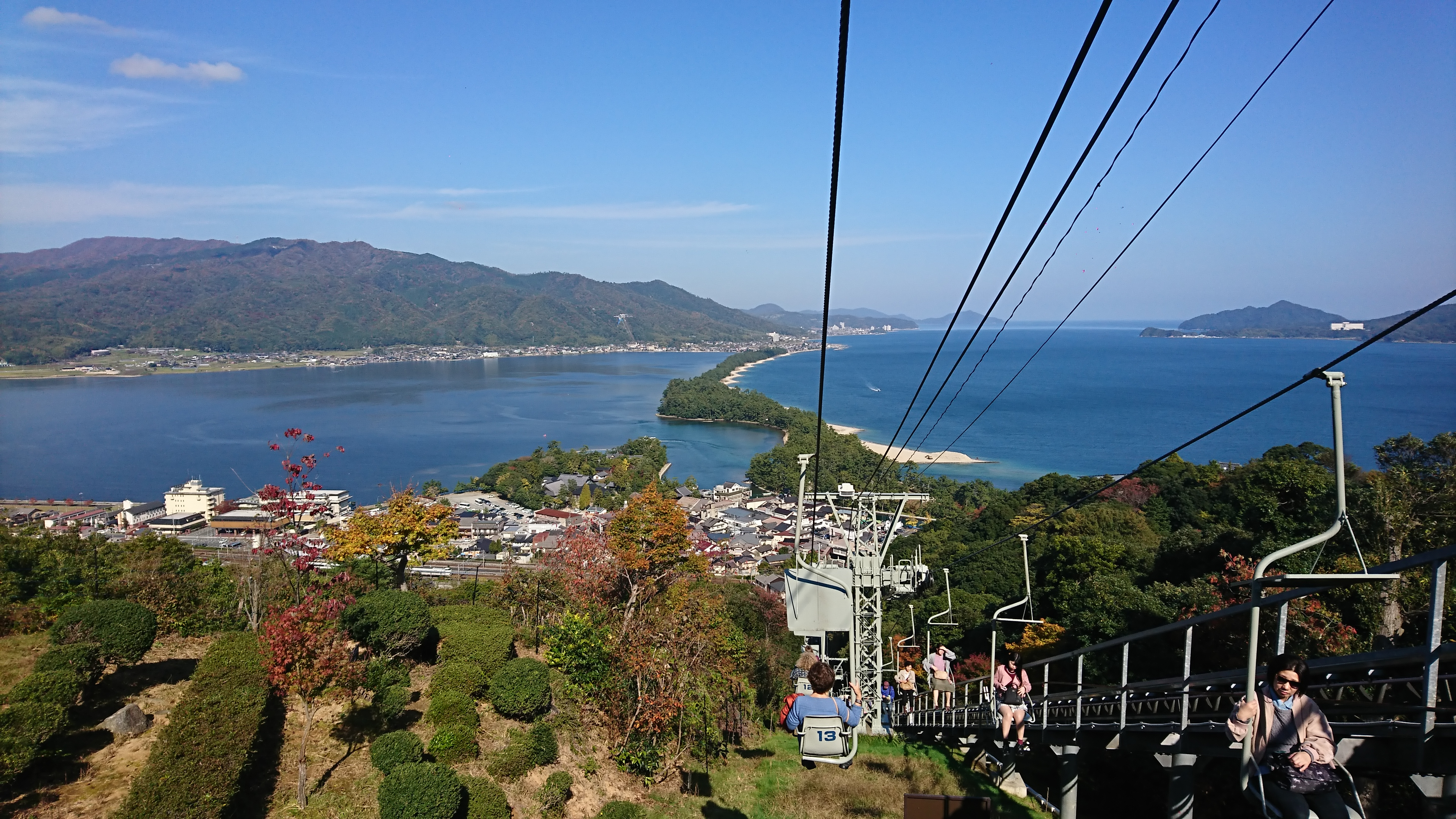 リフト山頂駅からの風景